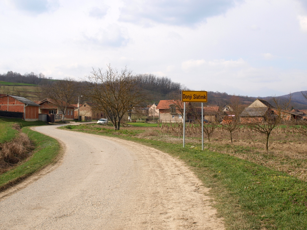 Ulaz u selo Donji Slatnik, Brodsko-posavska županija.